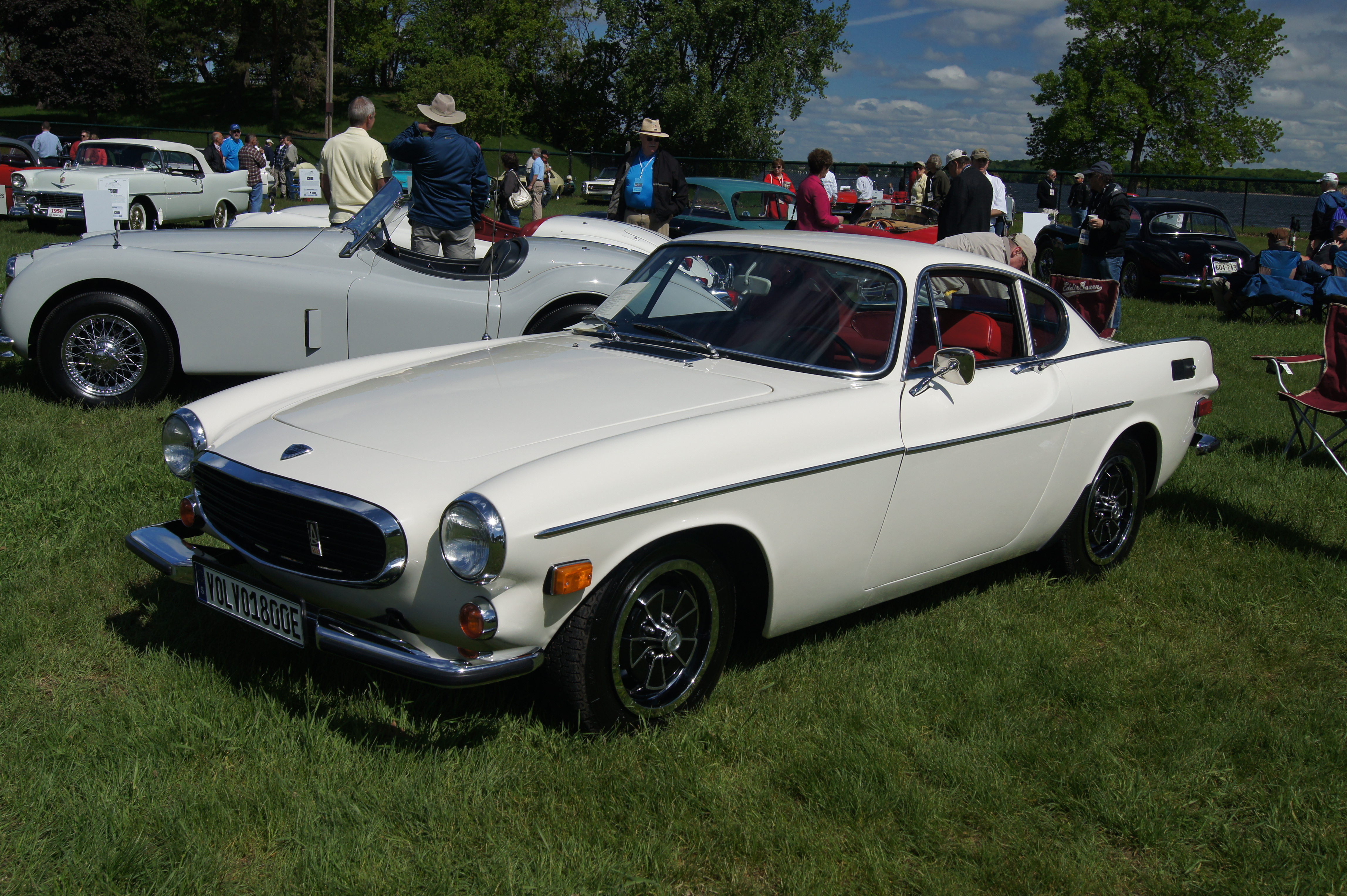 70 Volvo 1800E